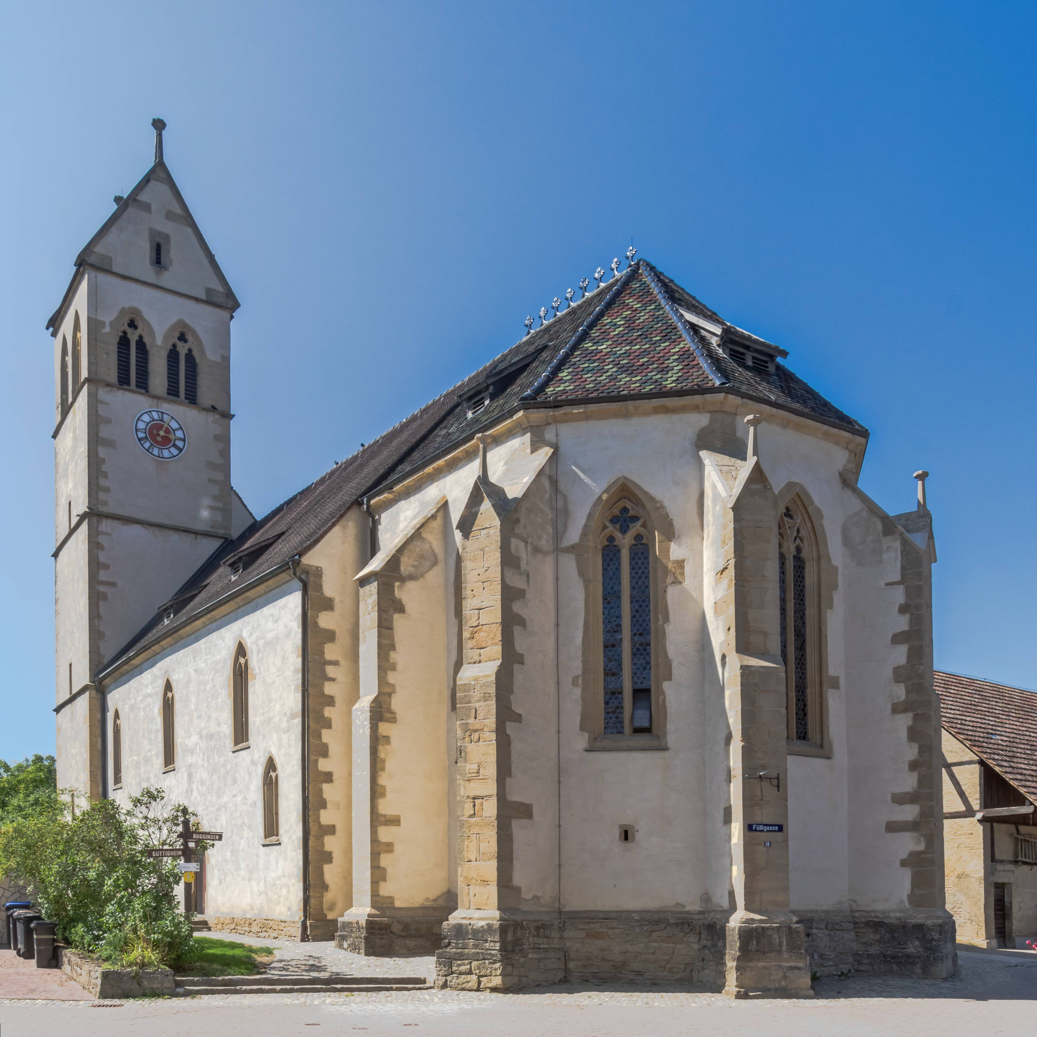 St. Aegidien in St. Ilgen einem Teilort von Laufen Außenansichten